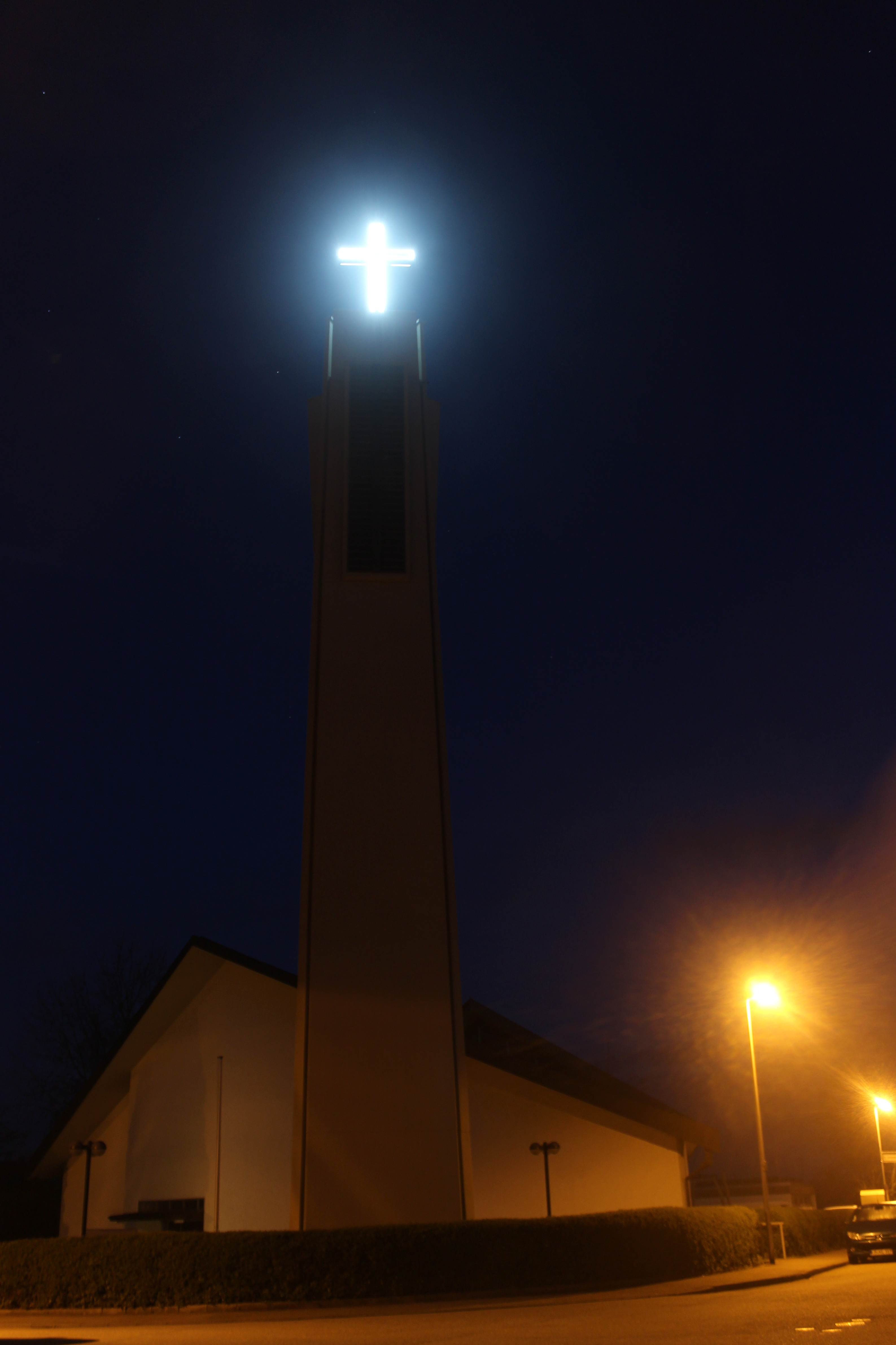 Kirchturm von Sankt Maria in Möglingen bei Nacht